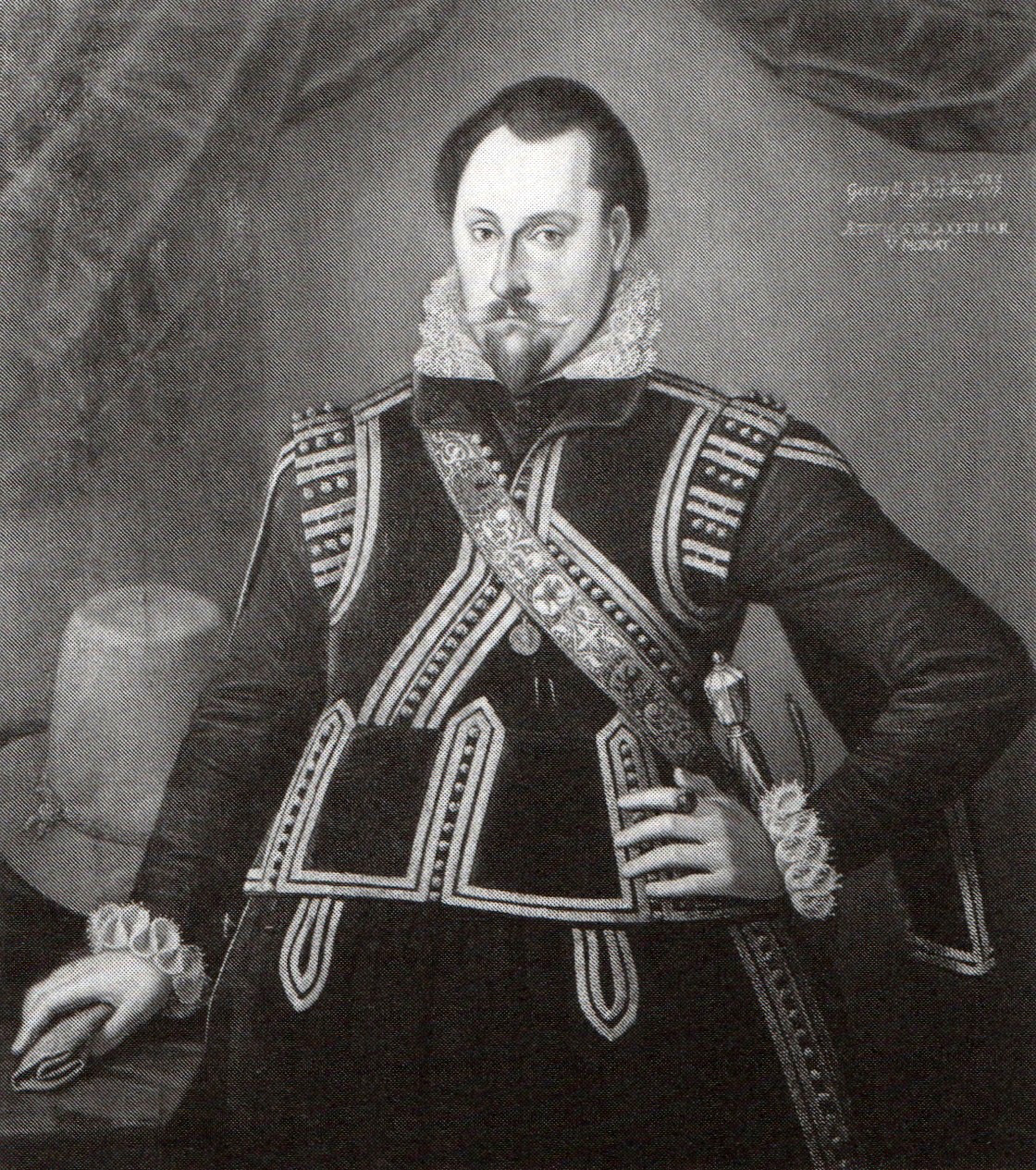 Ölgemälde von Herzog Georg II. von Pommern, früher Stadtmuseum Stettin, seit 1945 verschollen.